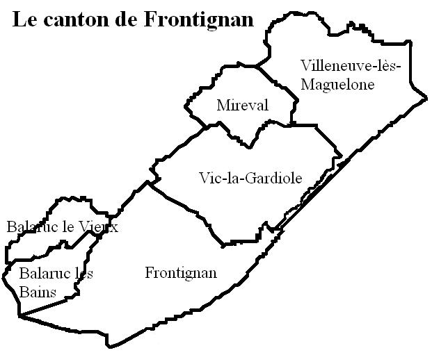 Le canton de Frontignan Image personnelle